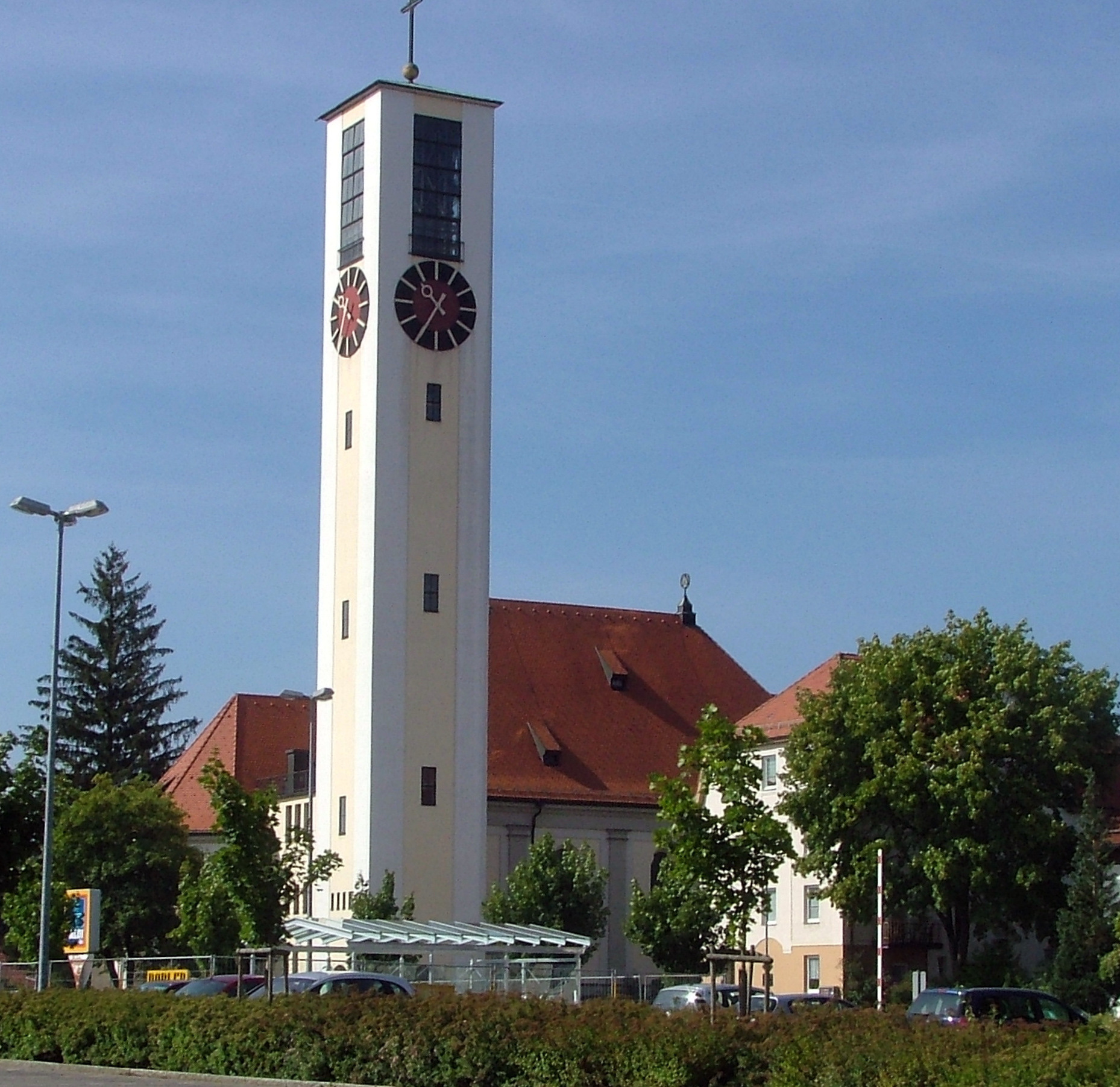 Kirche Mariä Himmelfahrt, Kempten